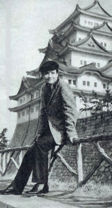 集英社『週刊明星』1月17日号(1965)より緒形拳。一部キャプションの塗りつぶし